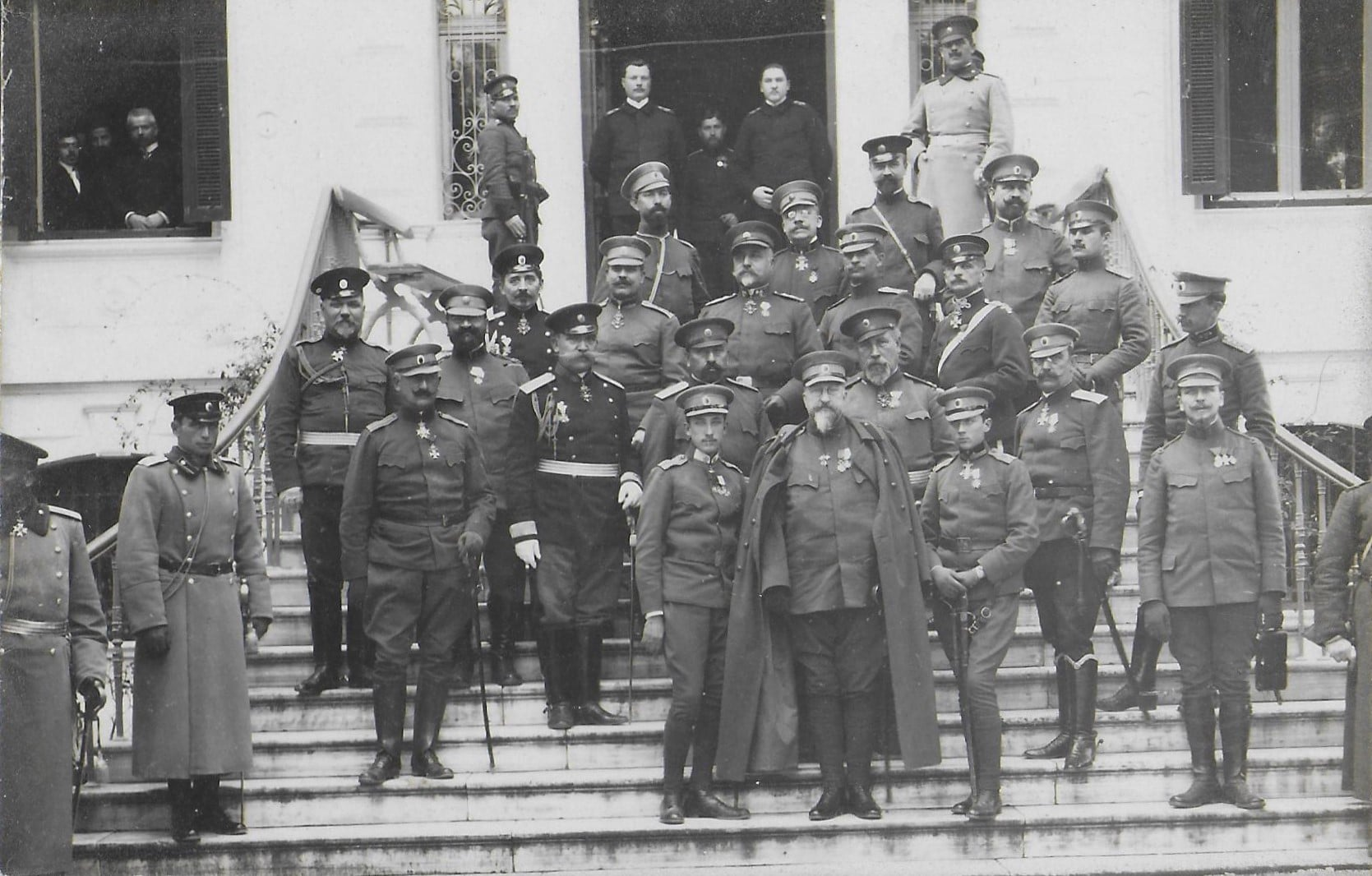 Цар Фердинанд в наскоро превзетия Солун